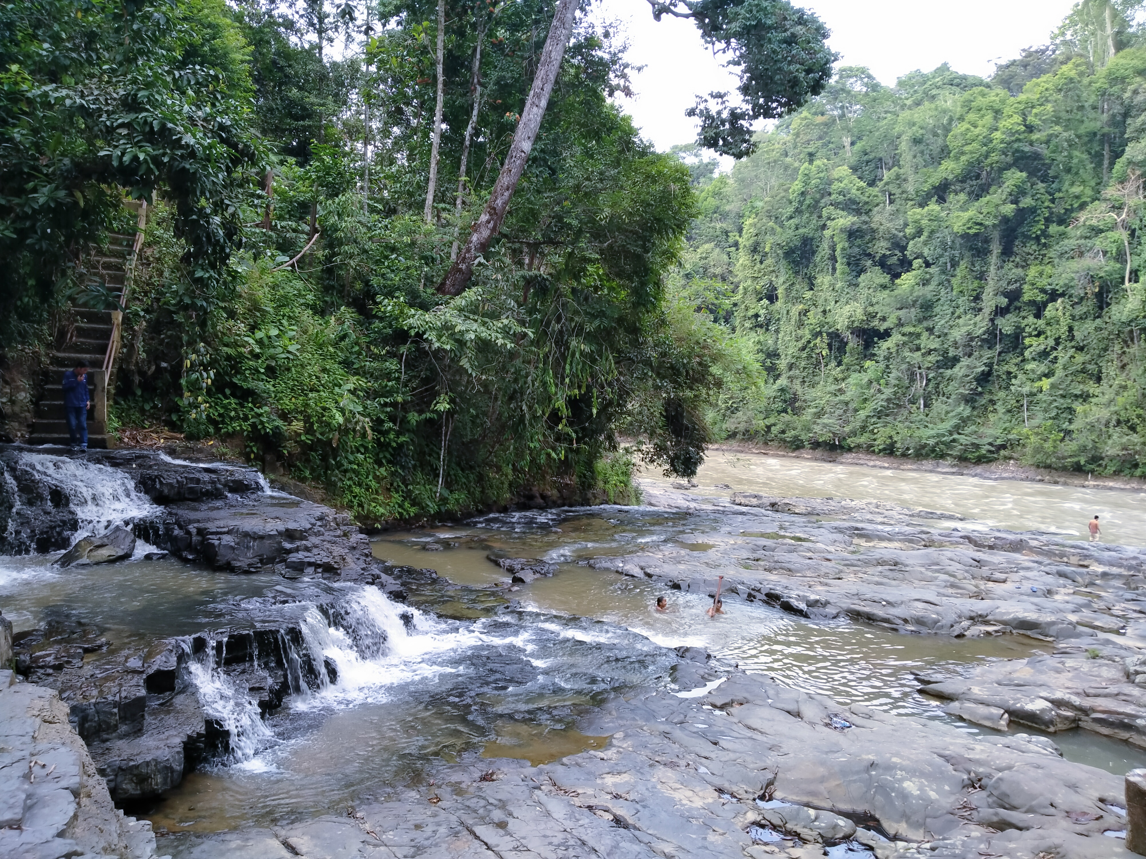 Geopark Merangin